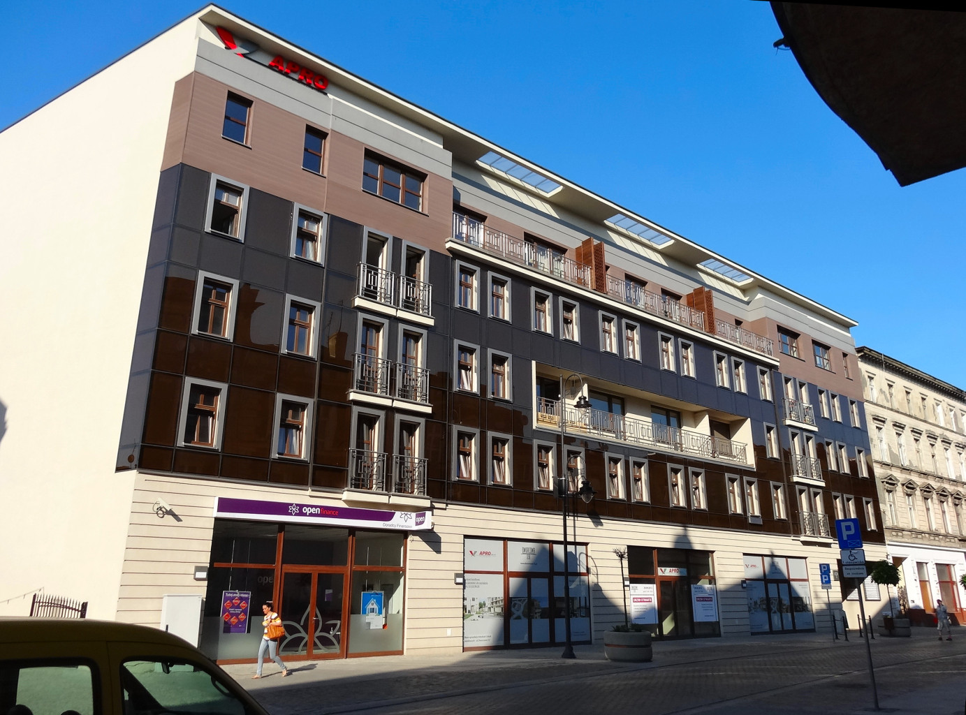 Dom Dworcowa 13 w Bydgoszczy